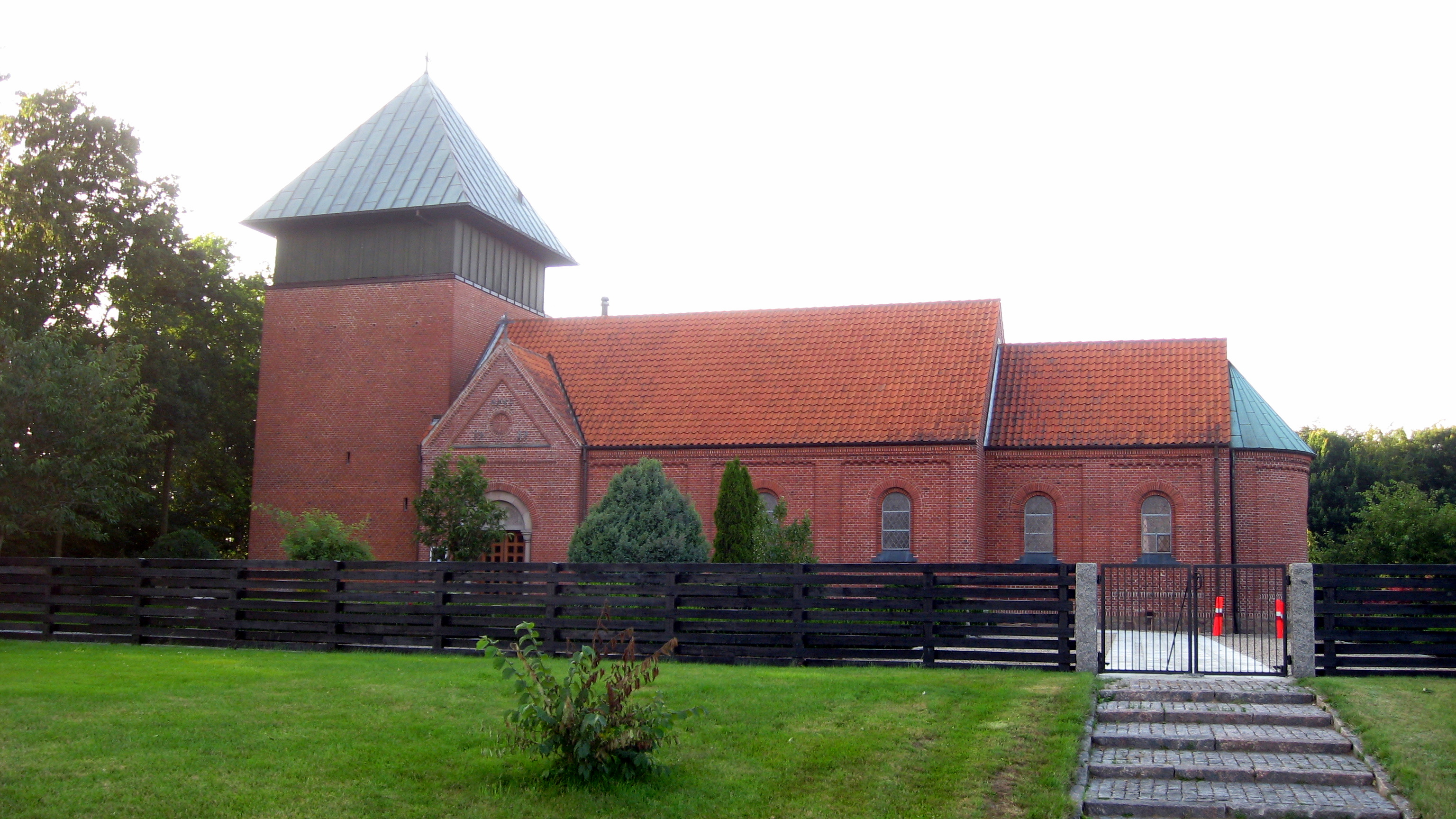 Badskær Kirke, Frederikshavn Kommune